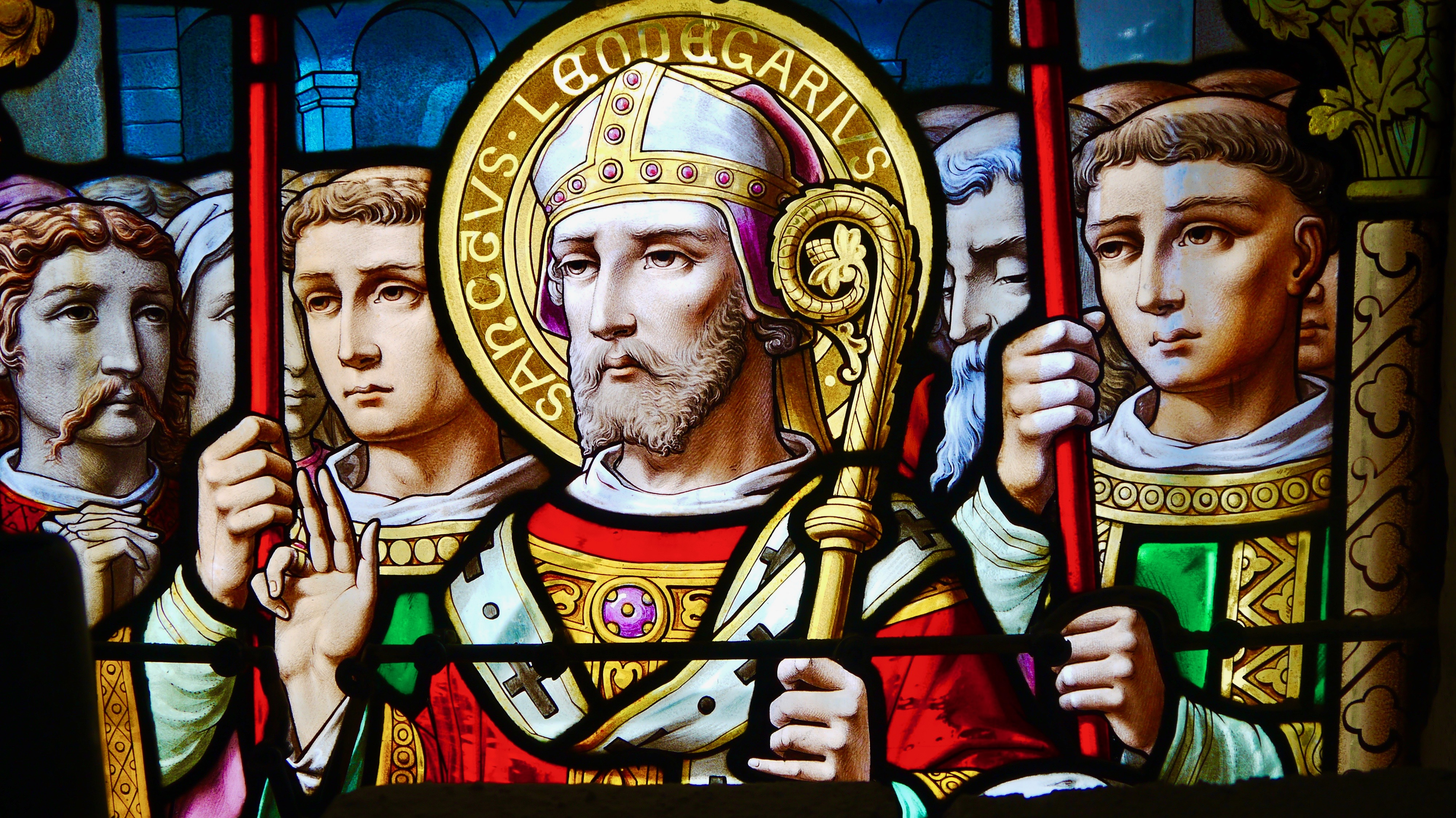 Détail d'une des vitrail du choeur de l'église St-Léger d'Orvault